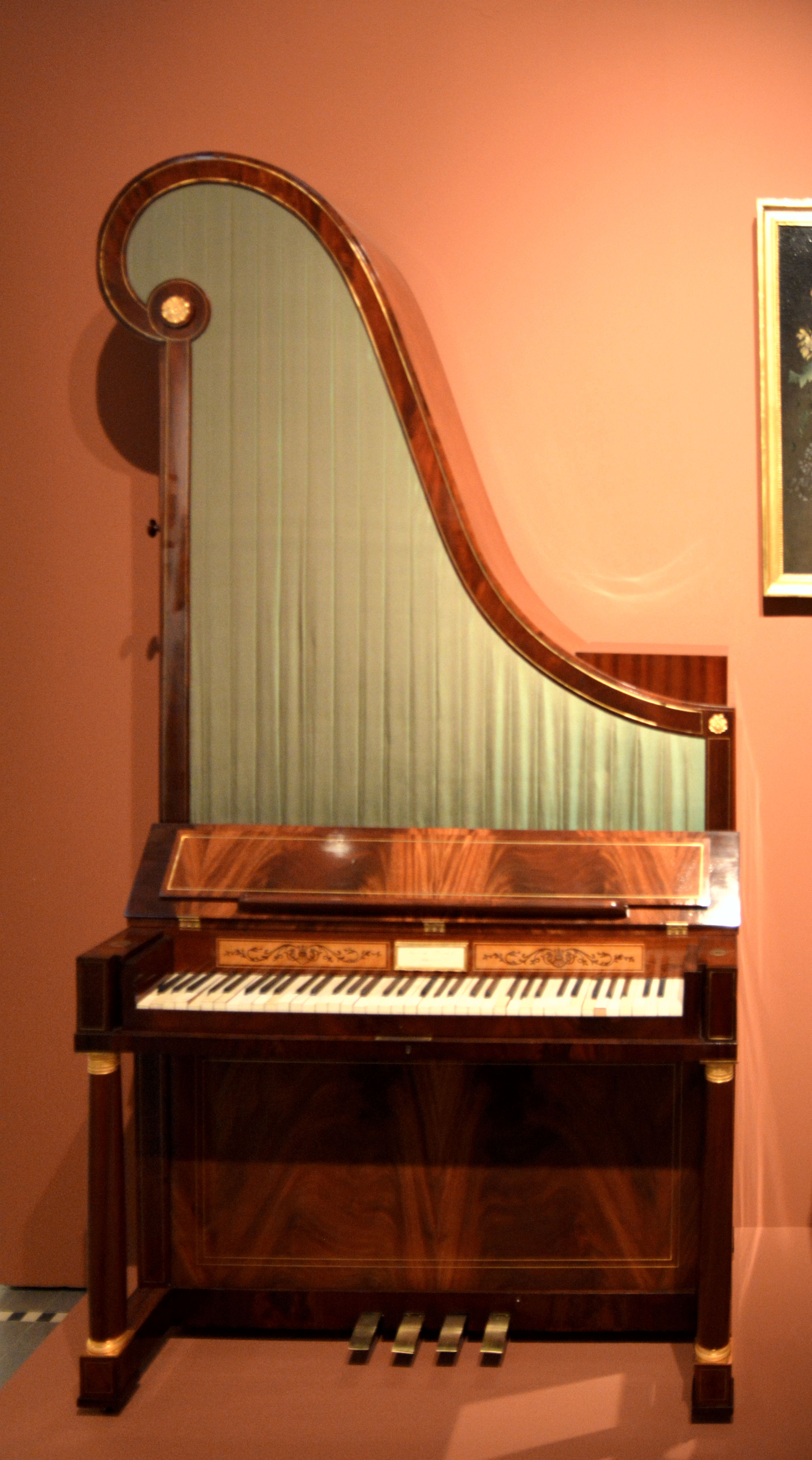 Fortepian żyrafa - wyprodukowany w wytwórni fortepianów Fryderyka Buchholtza w Warszawie ok. 1820 r; eksponat Muzeum Narodowego w Warszawie